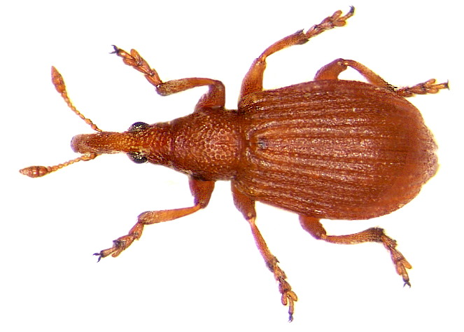 Familie: Apionidae Grösse: 3,3-4,5 mm Verbreitung: Mittel- und Vorderasien bis Europa Ökologie: Entwicklung in den Stengeln von Rumex-Arten Fundort: Germania, Bayern, Oberfranken, Kulmbach leg. det. U.Schmidt, 1972 Foto: U.Schmidt, 2005